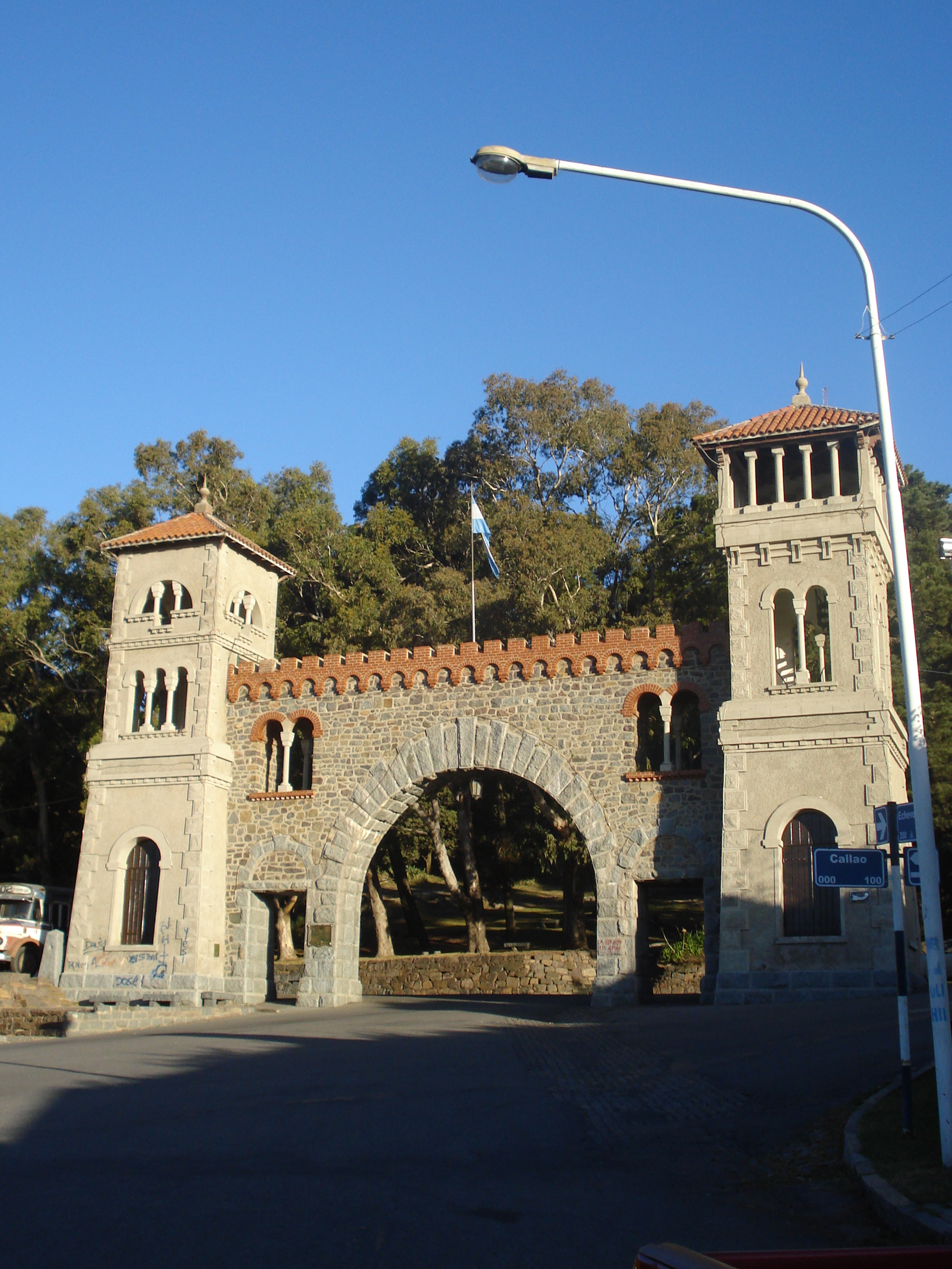 Parque Independencia en Tandil, Buenos Aires, Argentina.